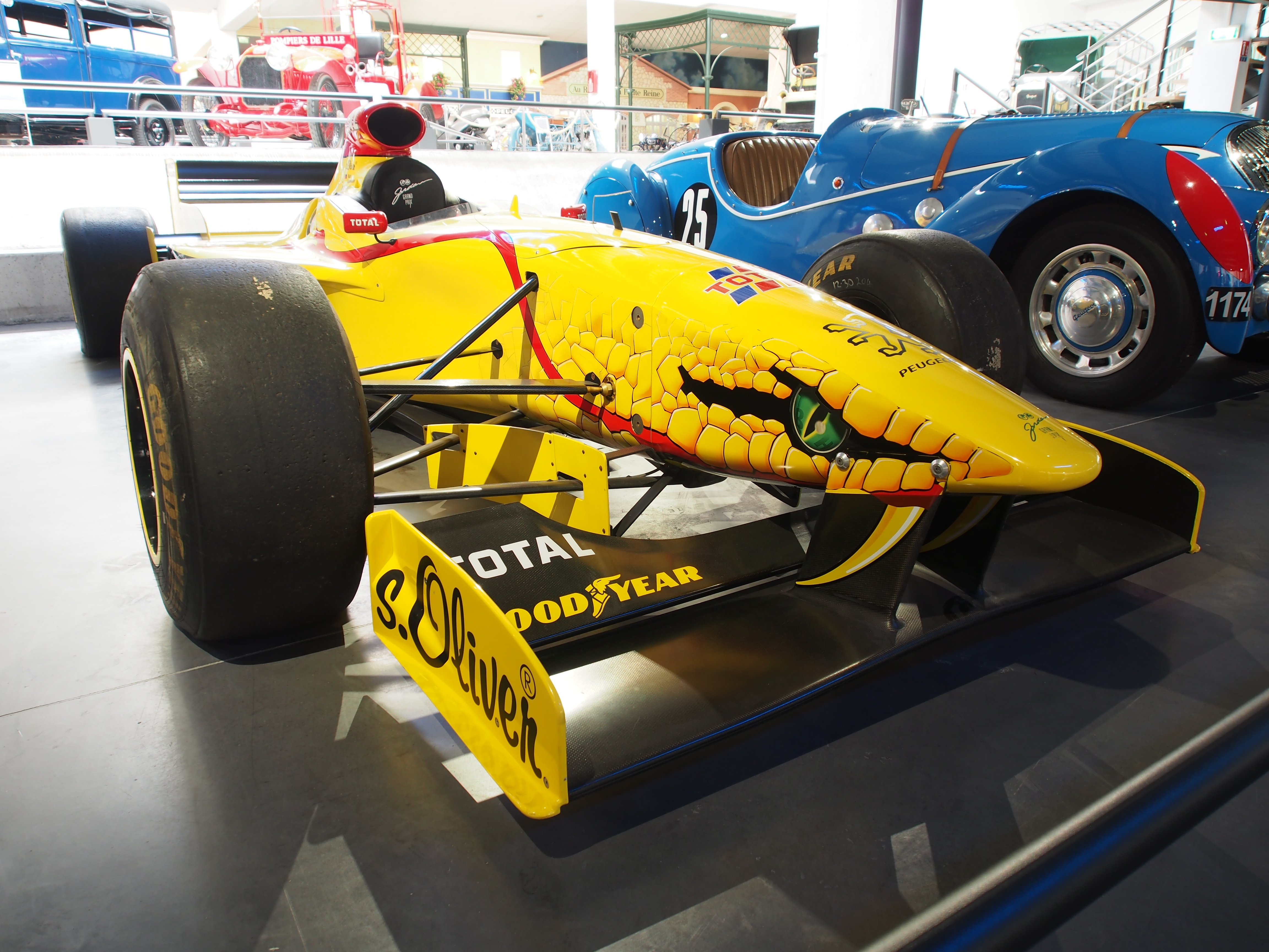 Photographed at the Musée de l'Aventure Peugeot-Sochaux, France.